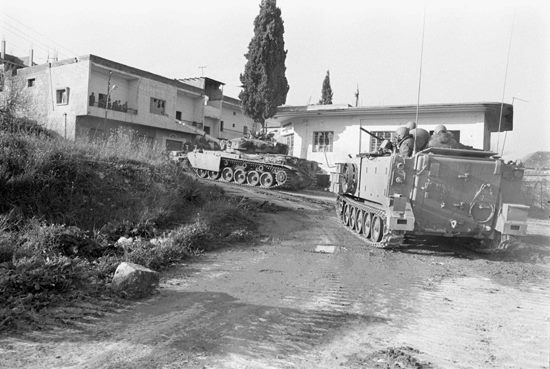 מבצע ליטני (15/3-21/3 1978). טור נגמ"שים M113 בתנועה בשטח הררי בדרום לבנון. ברקע כפר לבנוני.